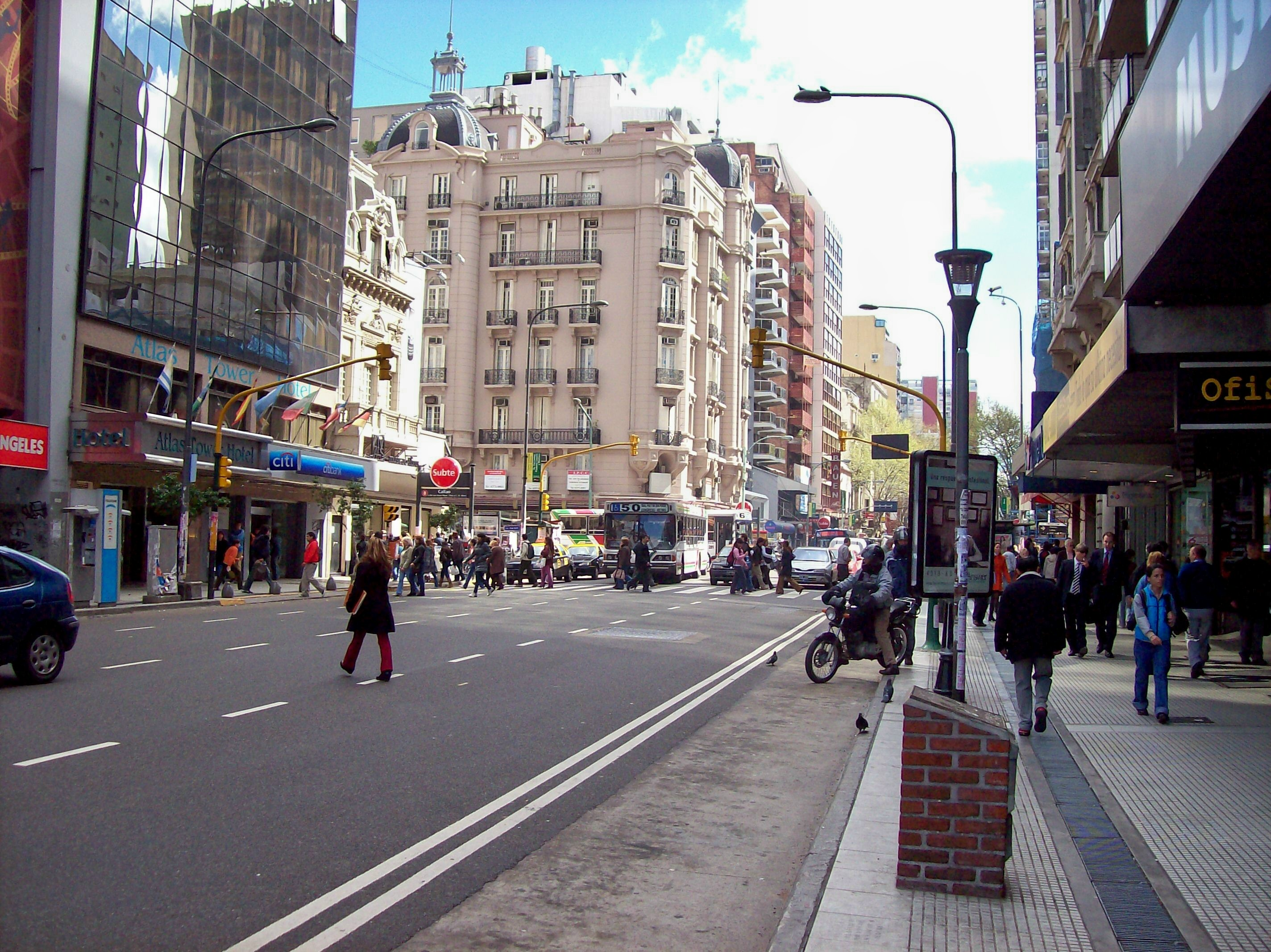 Avenida Corrientes y Callao (Ciudad de Buenos Aires). Recordatorio de Alberto Olmedo visible a la derecha.